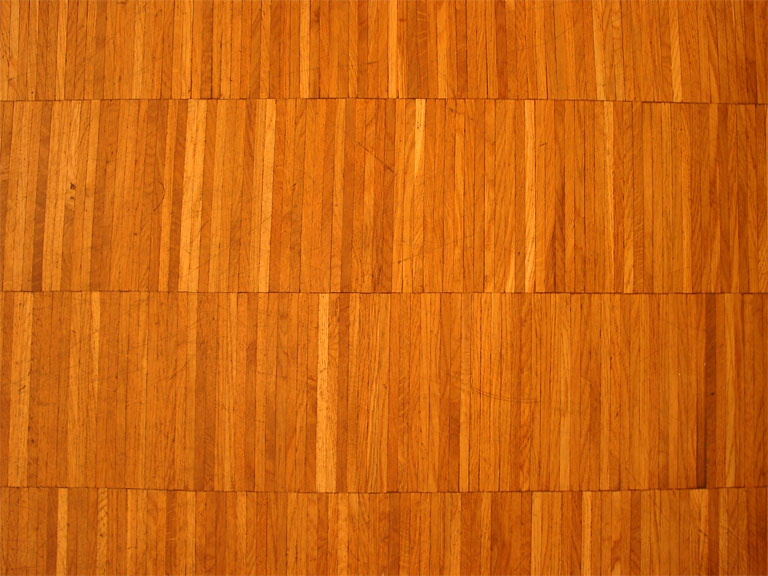 Parkett 02 KMJ